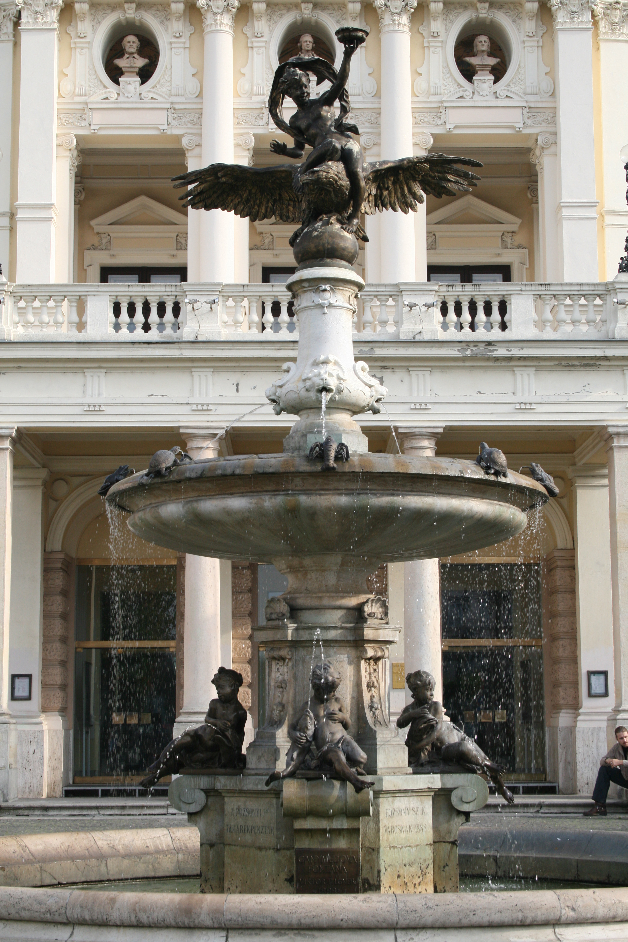 Neobaroková Ganymédova fontána z roku 1888 pred budovou SND na Hviezdoslavovom námestí v Bratislave. Autorom fontány bol Viktor Oskar Tilgner. Na jej vrchole je bronzová plastika Ganymedesa ako je unášany Diom v podobe orla.